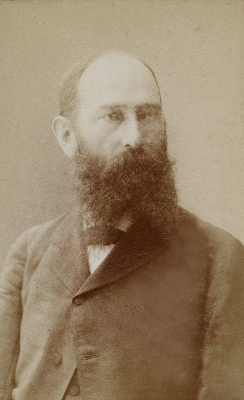 Pierre Foncin